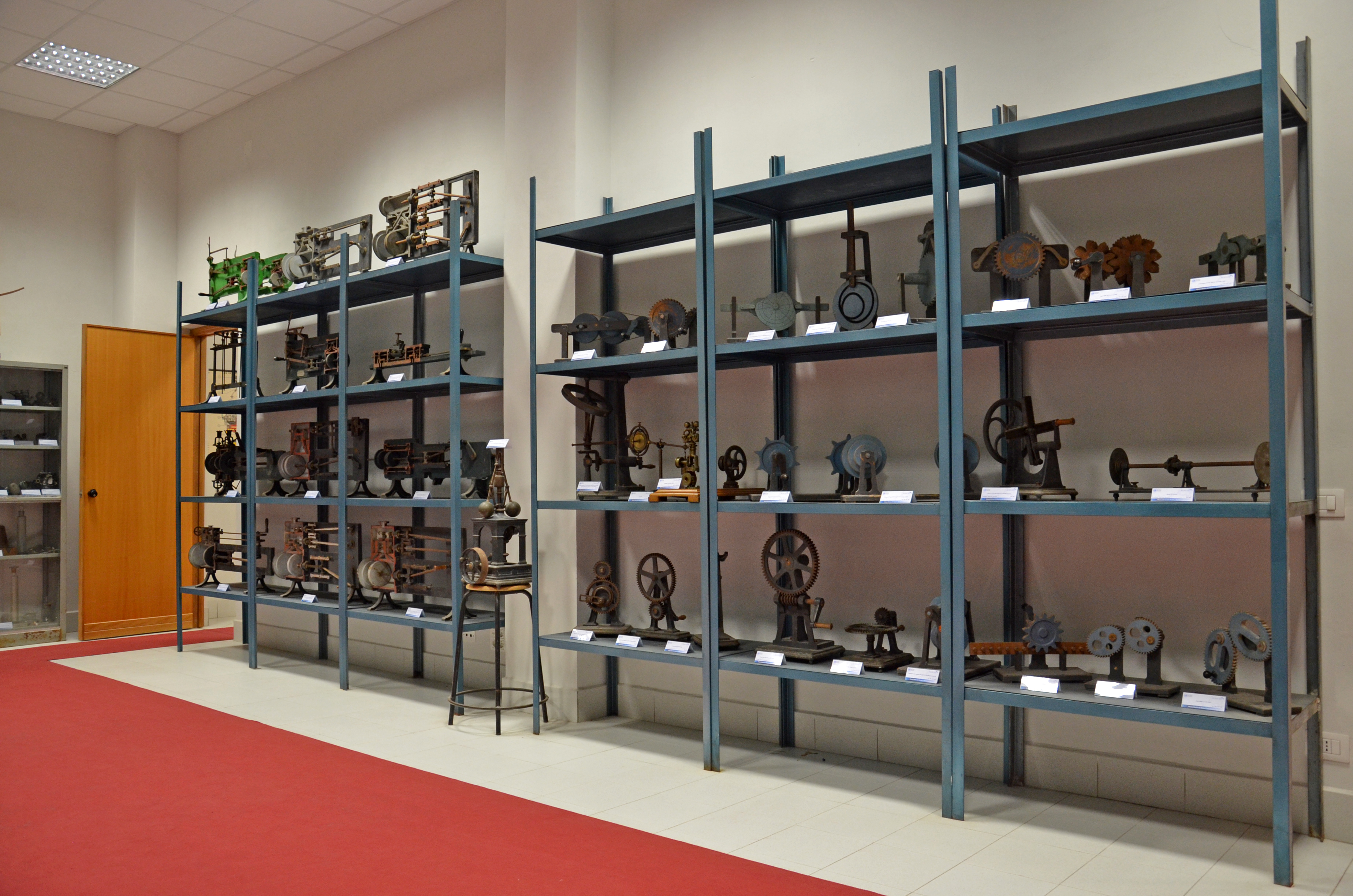 La sala espositiva con in modelli didattici